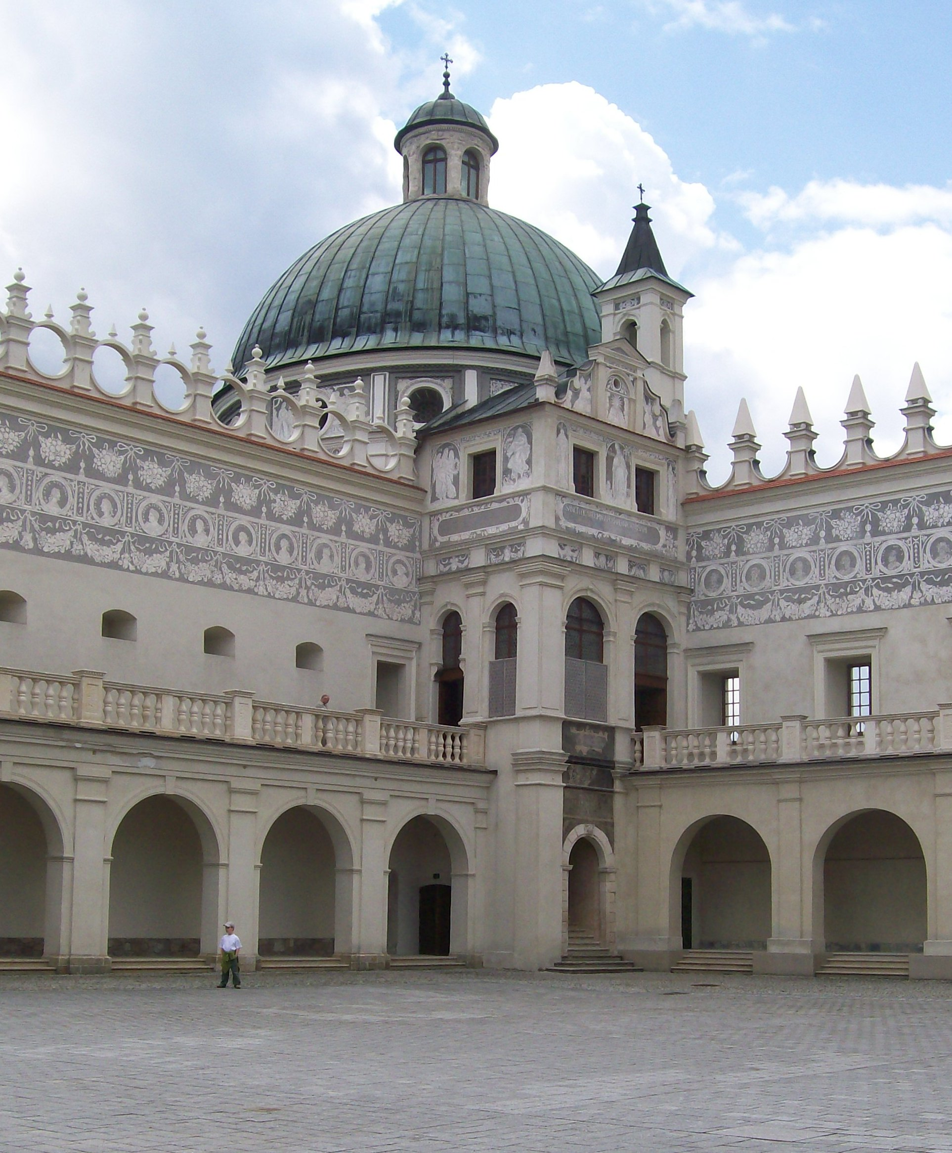 Zamek w Krasiczynie.